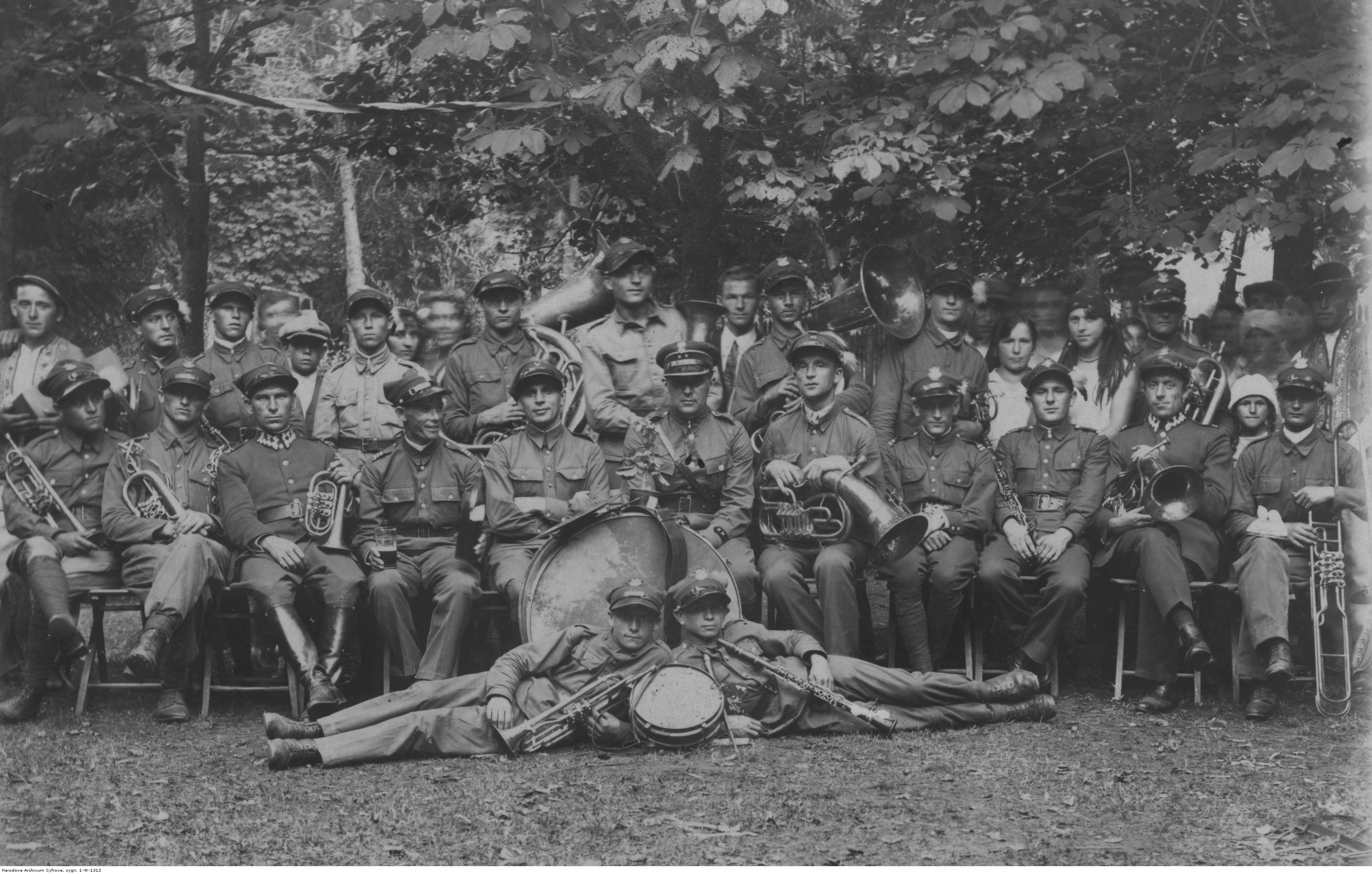 Orkiestra 1 Pułku Strzelców Podhalańskich w Nowym Sączu. Koncern Ilustrowany Kurier Codzienny - Archiwum Ilustracji. Sygnatura: 1-W-1312